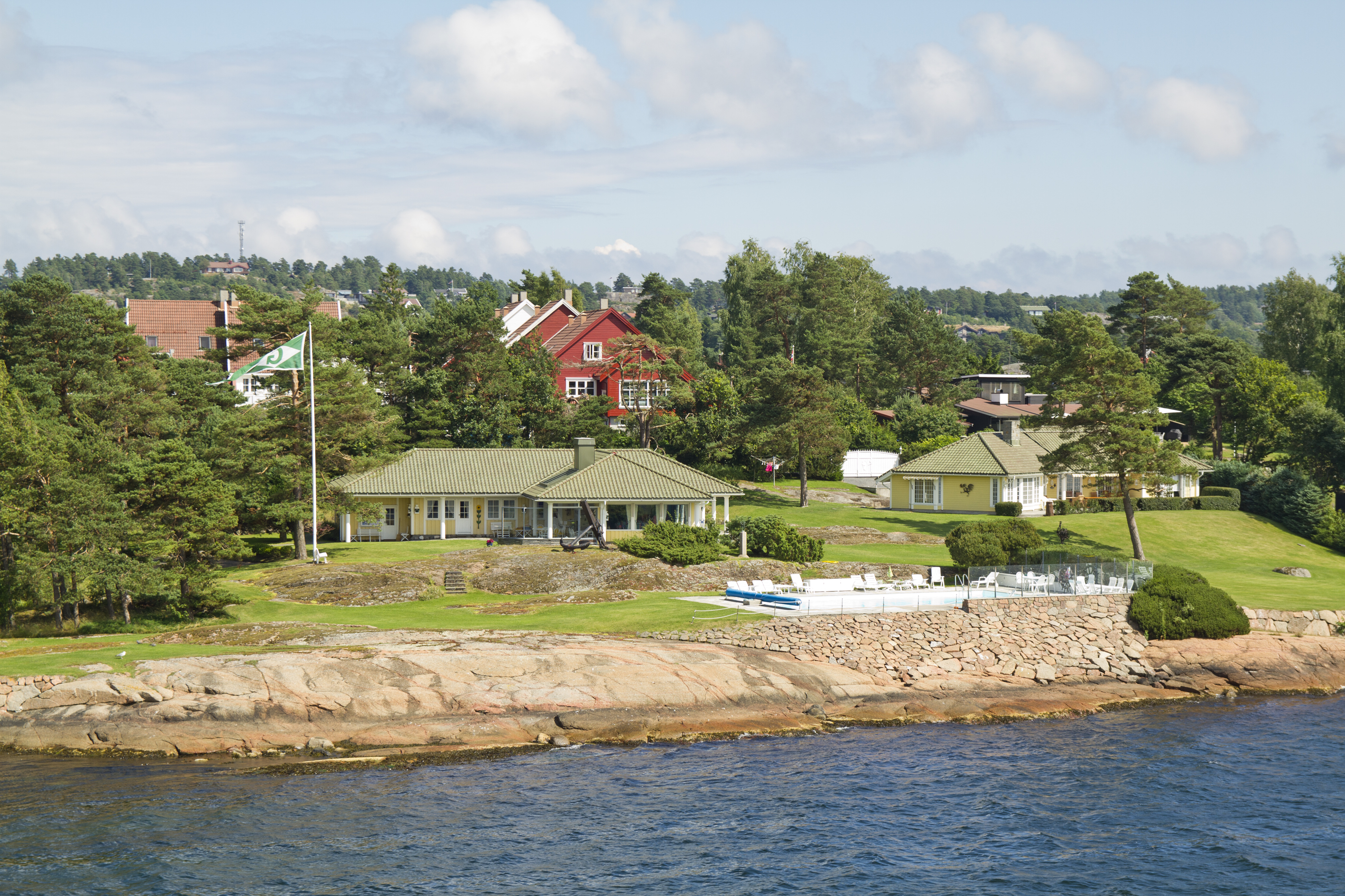 Åsnes